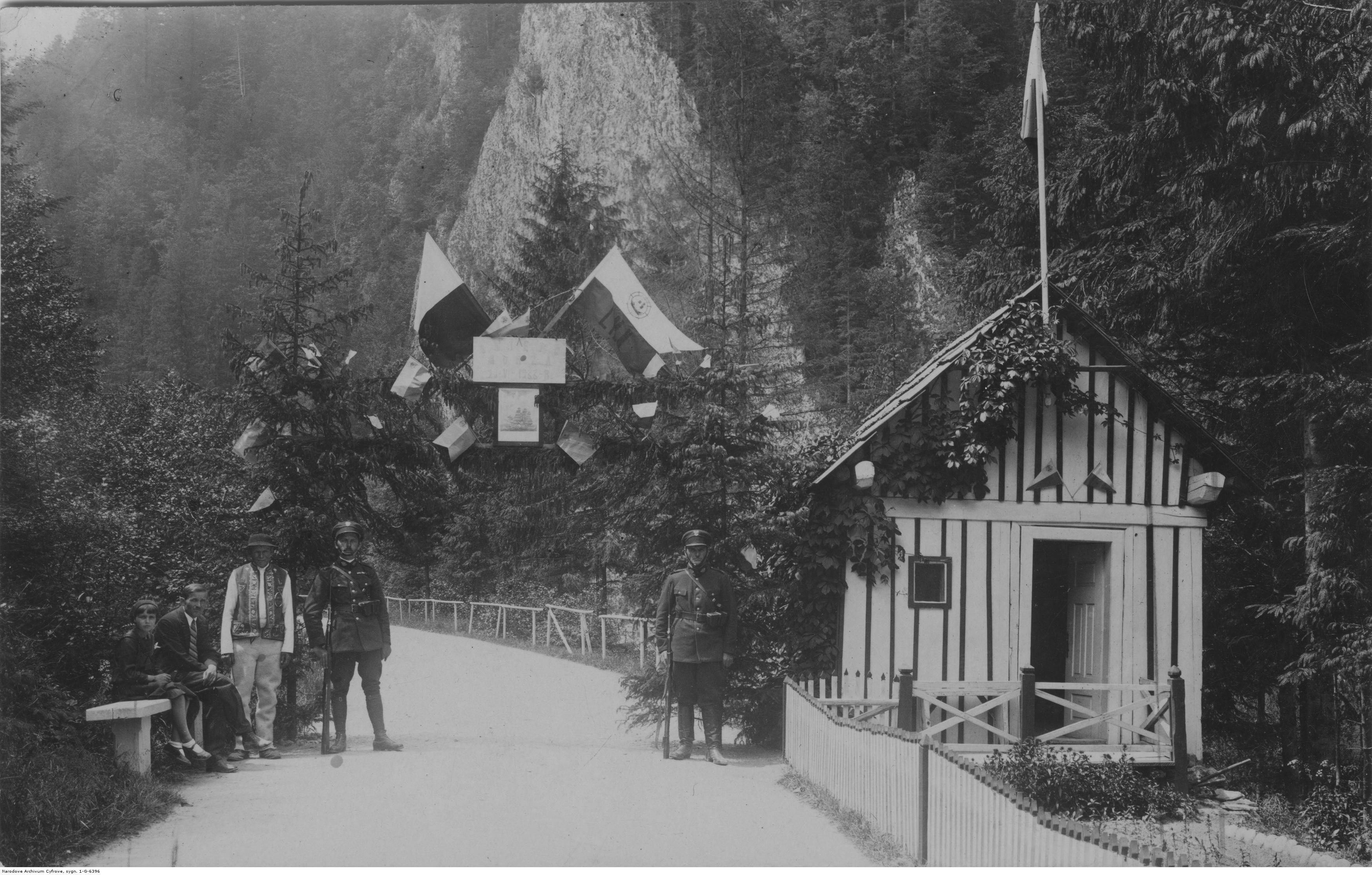 Posterunek Straży Granicznej koło Krościenka (granica z Czechosłowacją); 1933 r. Koncern Ilustrowany Kurier Codzienny - Archiwum Ilustracji. Sygnatura: 1-G-6396